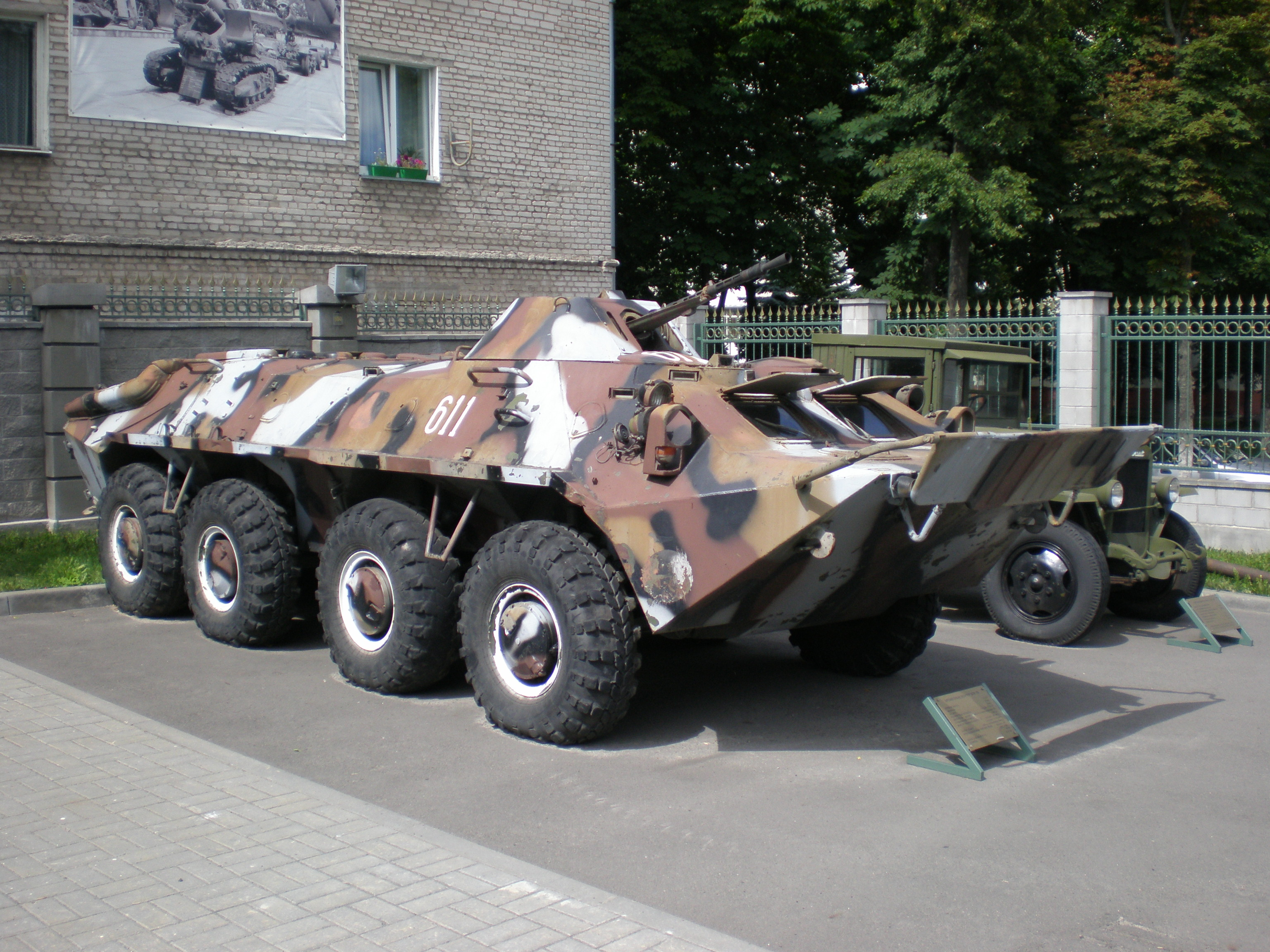 BTR-70 at a museum in Belarus.